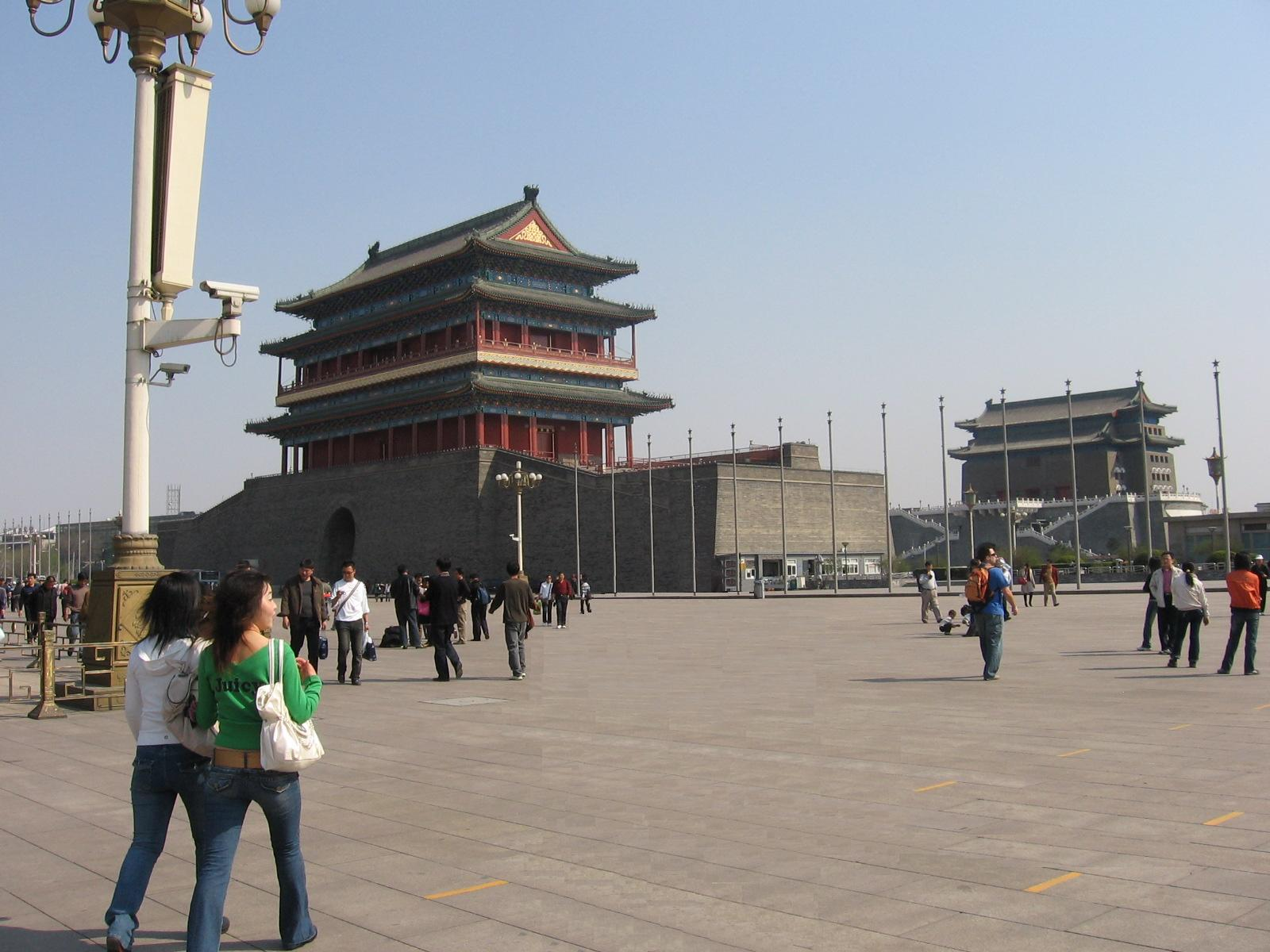 Bâtisses à Beijing